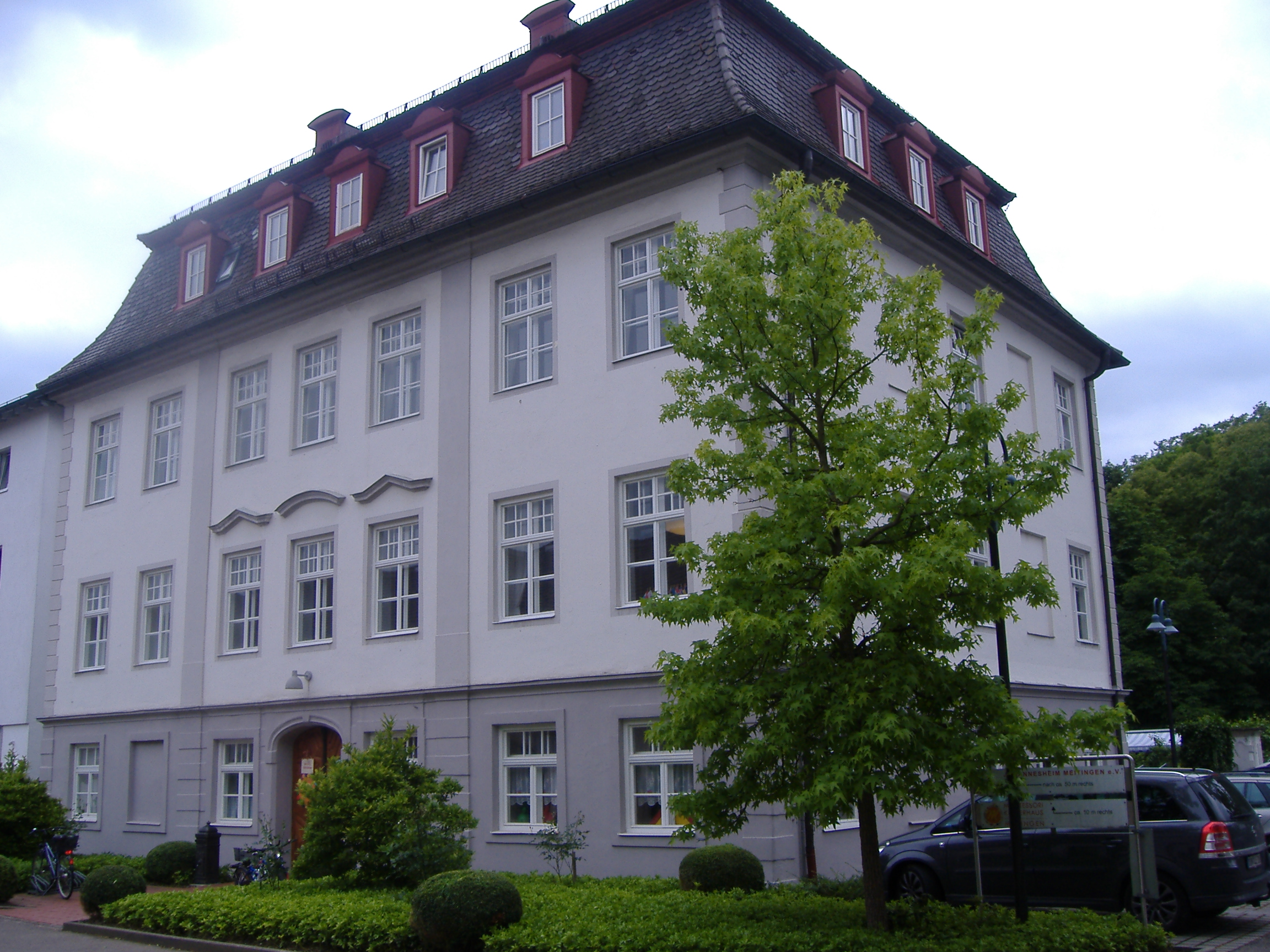 Schloss Meitingen